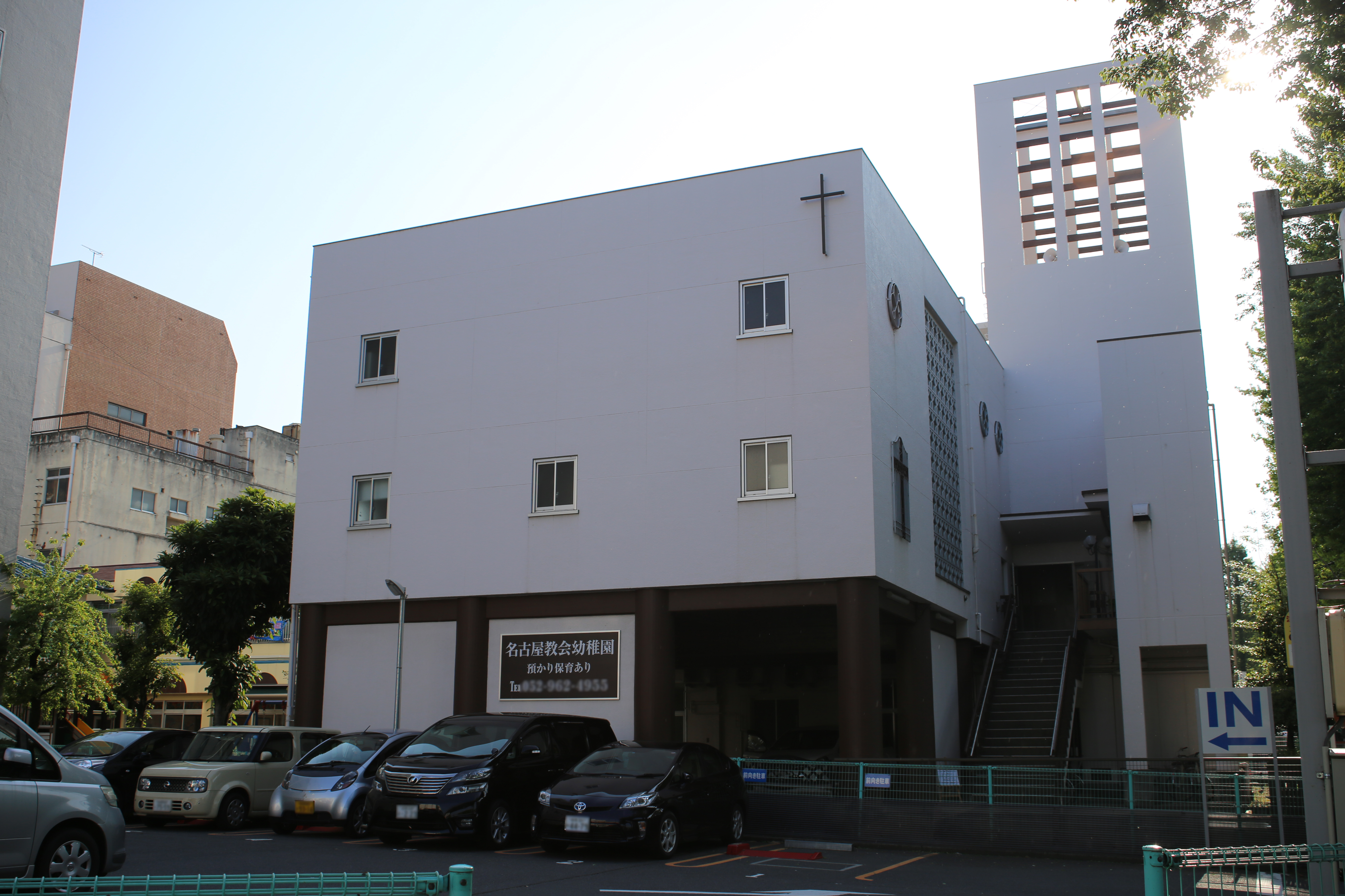 名古屋市中区丸の内三丁目の名古屋教会幼稚園を東側公道北側より撮影。ただし、ナンバープレートおよび電話番号につき画像処理済み。